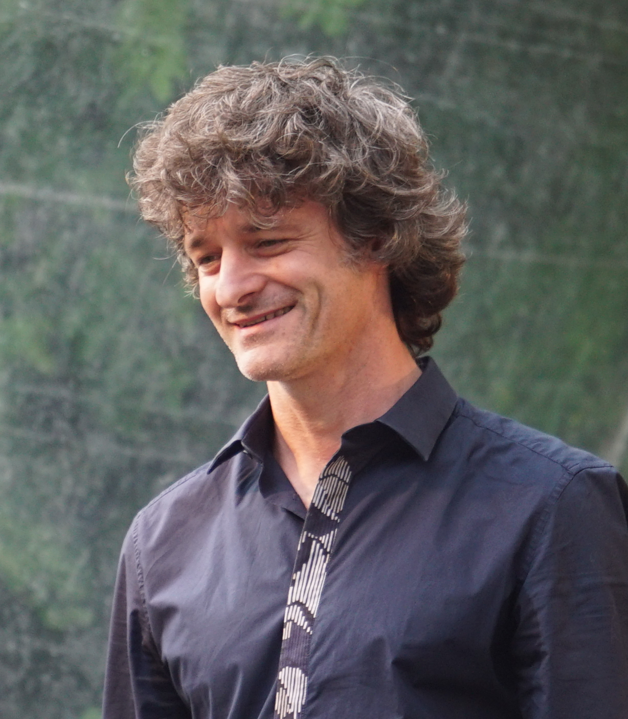 vue de la représentation au domaine Canard Duchêne.